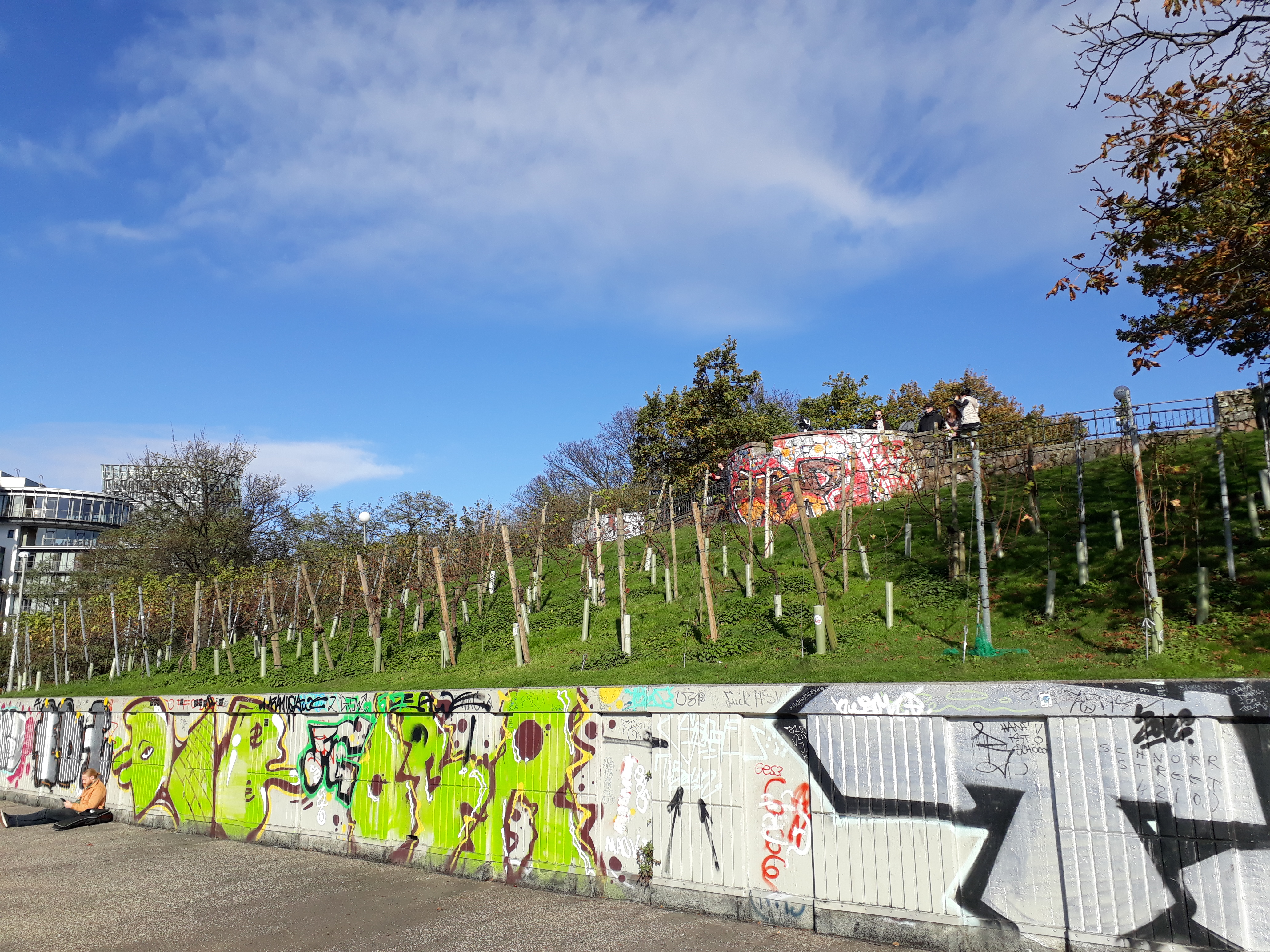 Weinberg auf dem Stintfang, Hmaburg